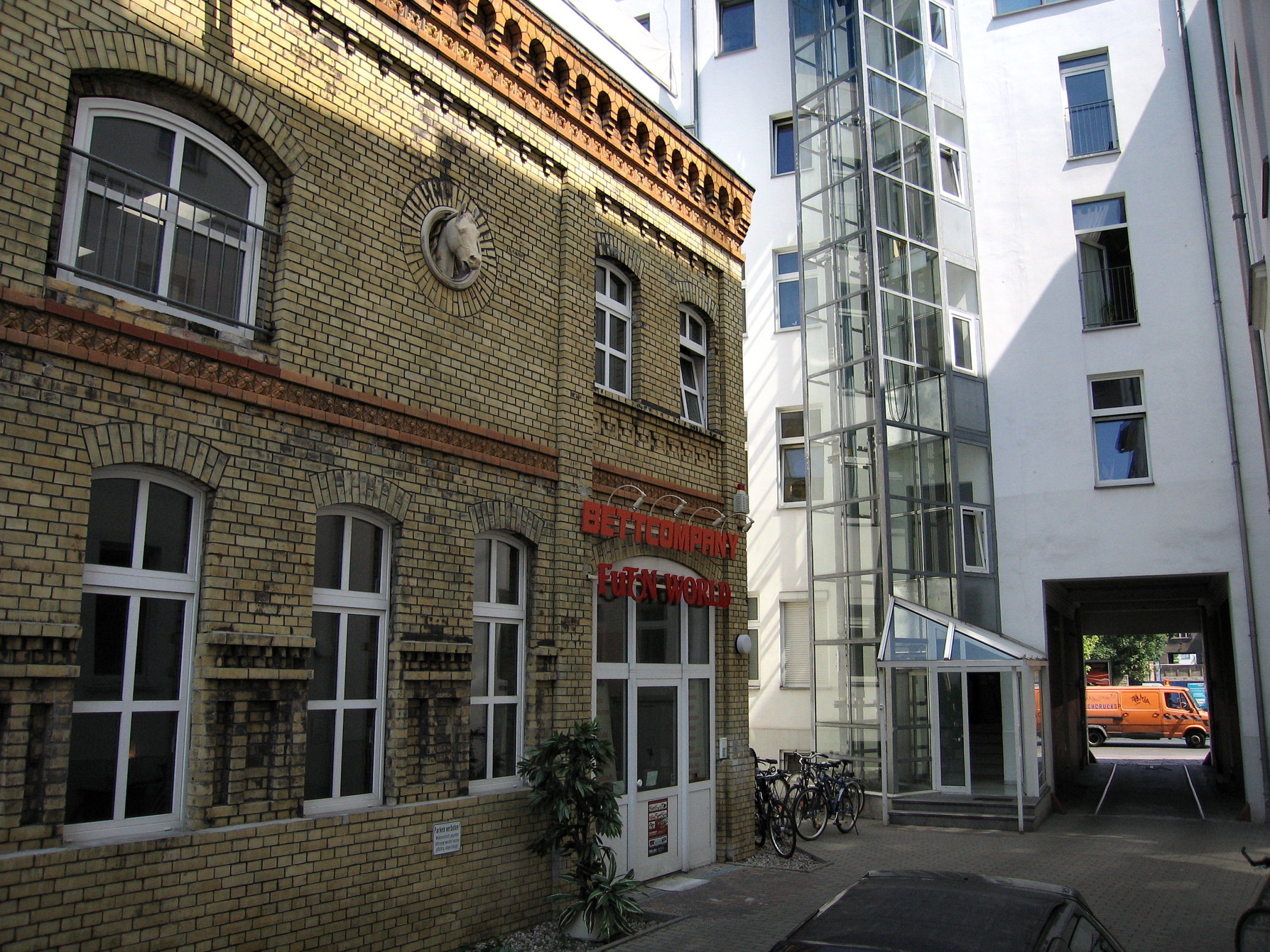 Die Hofansicht mit ehem. Pferdestall in der Chausseestraße Nr. 103. Foto 2007